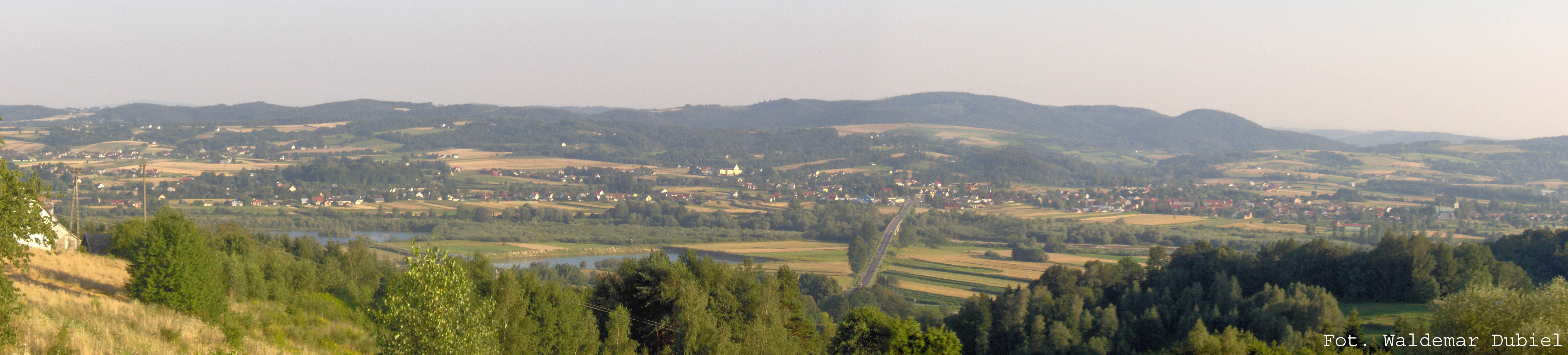 Zakliczyn - widok ze zbocza Roztoki.